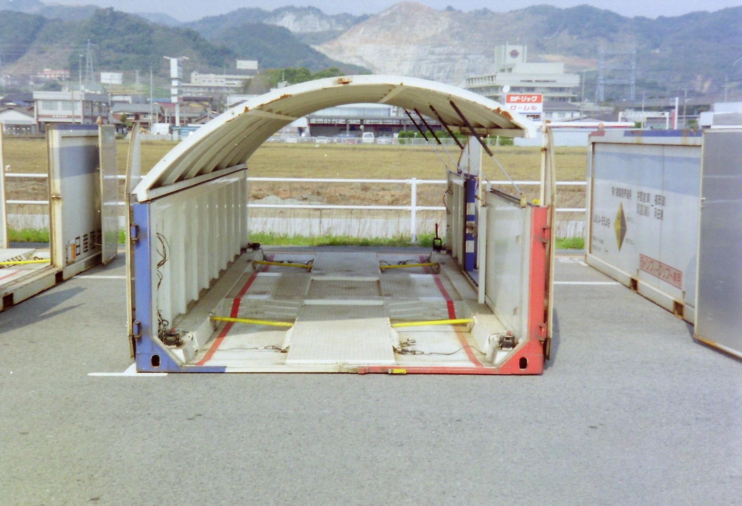 日産九州工場で完成した新車を、１コンテナに１台を積み込み二段積で１ユニットとして合計、２台を輸送する新型仕様の特殊コンテナ。 ※詳しくは画像拡大の上、焼付け説明文を参照して下さい。 【1995年04月 福岡県／苅田港】